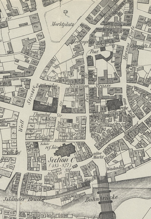 Das Elberfelder Zentrum. Kartenauschnitt aus dem Elberfelder Grundplan aus 1849